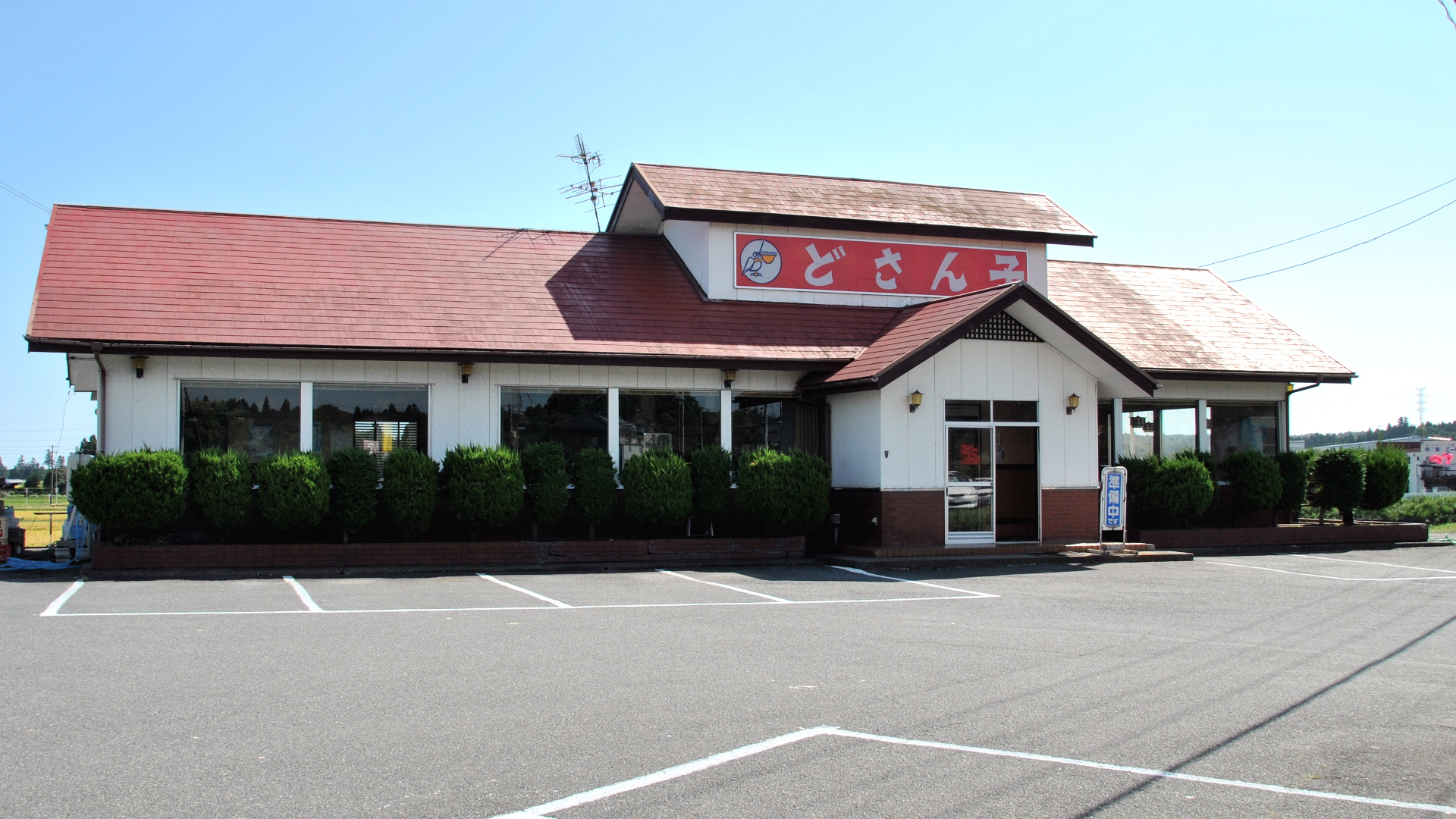 どさん子原町6号店